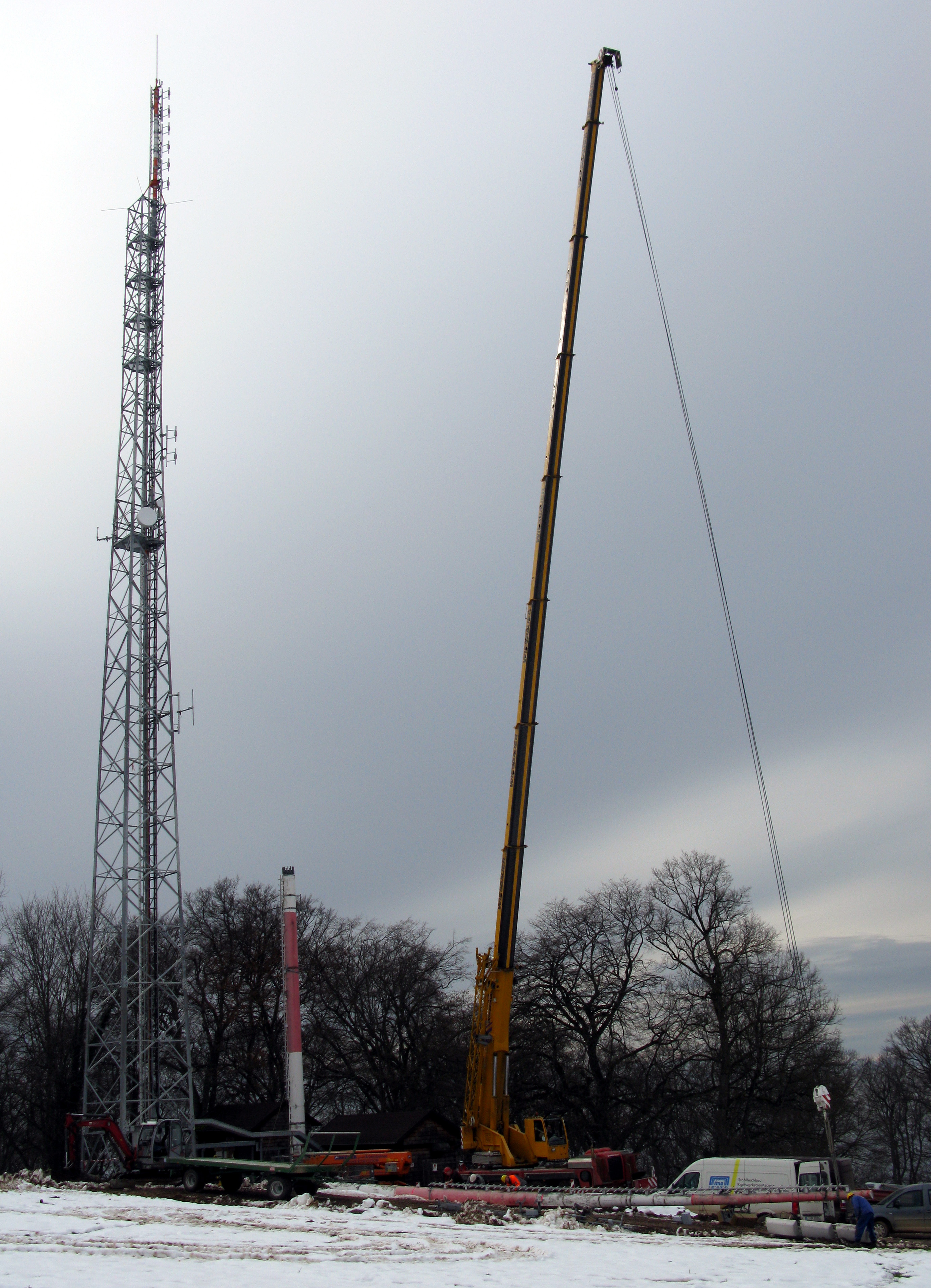 Metallgitter-Sendemast auf dem Schönberg (Ebringen) bei Demontage des alten Betonmastes